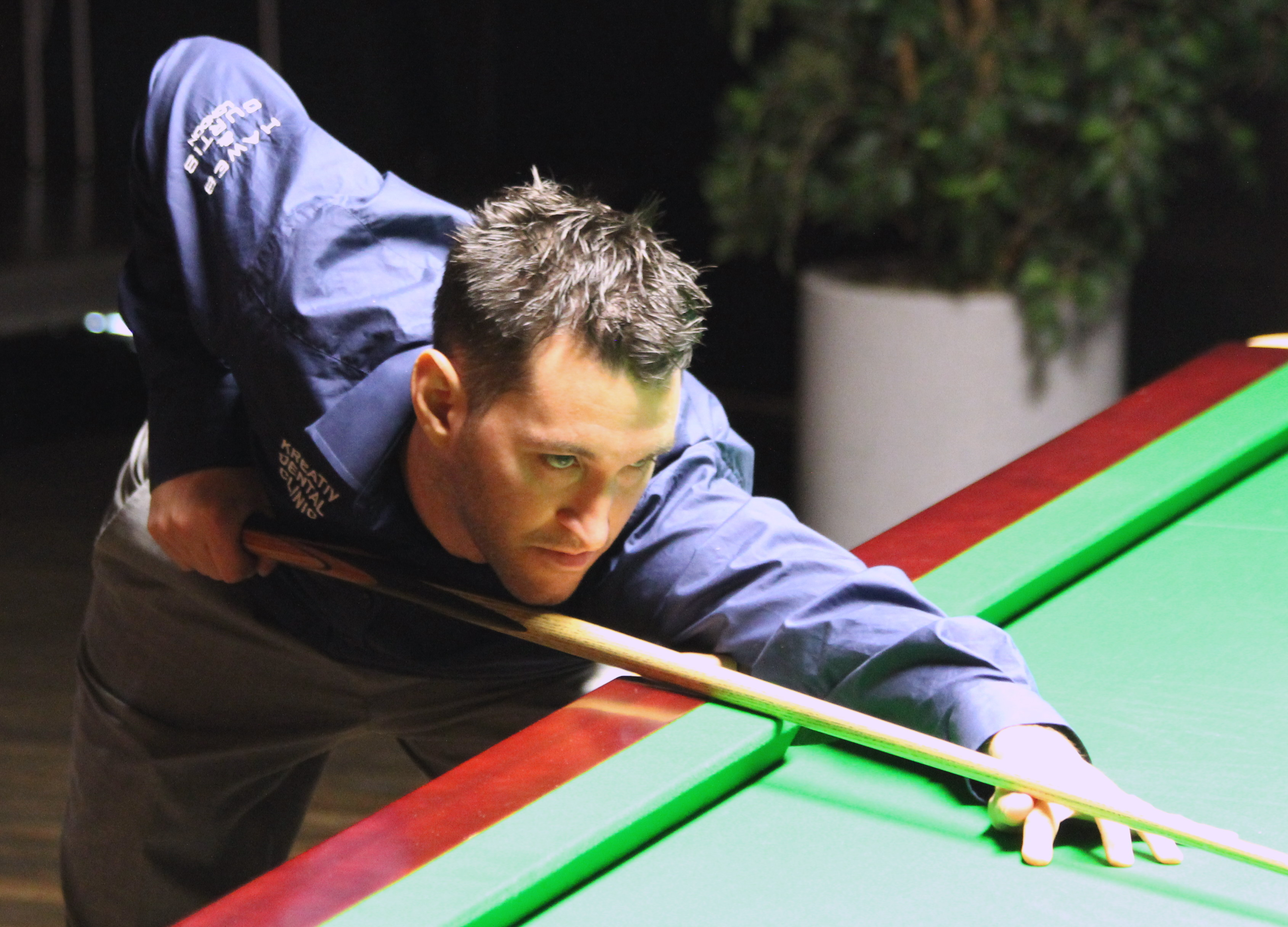 Tom Ford beim Paul Hunter Classic 2015